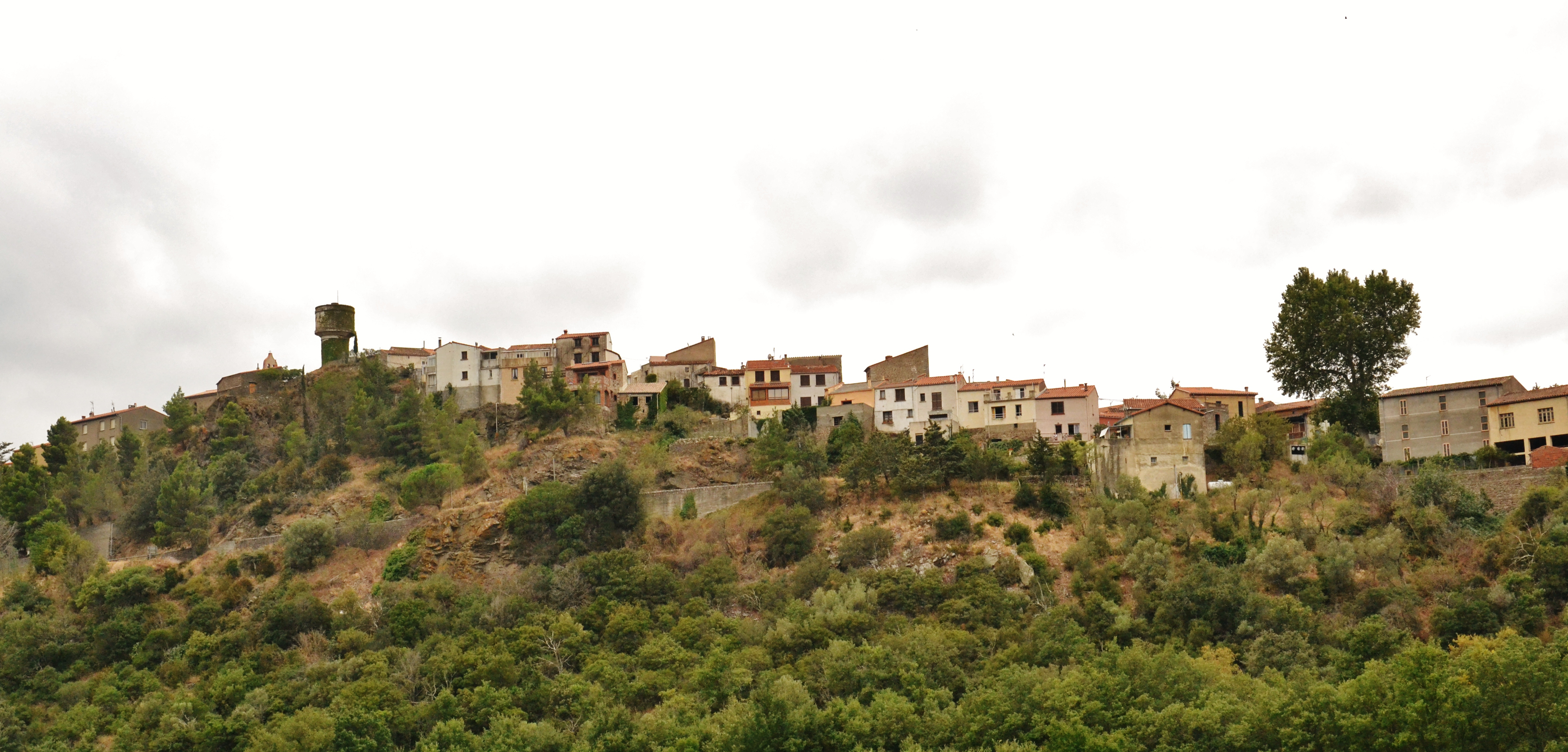 Le village d'Ansignan (Pyrénées-Orientales, France)